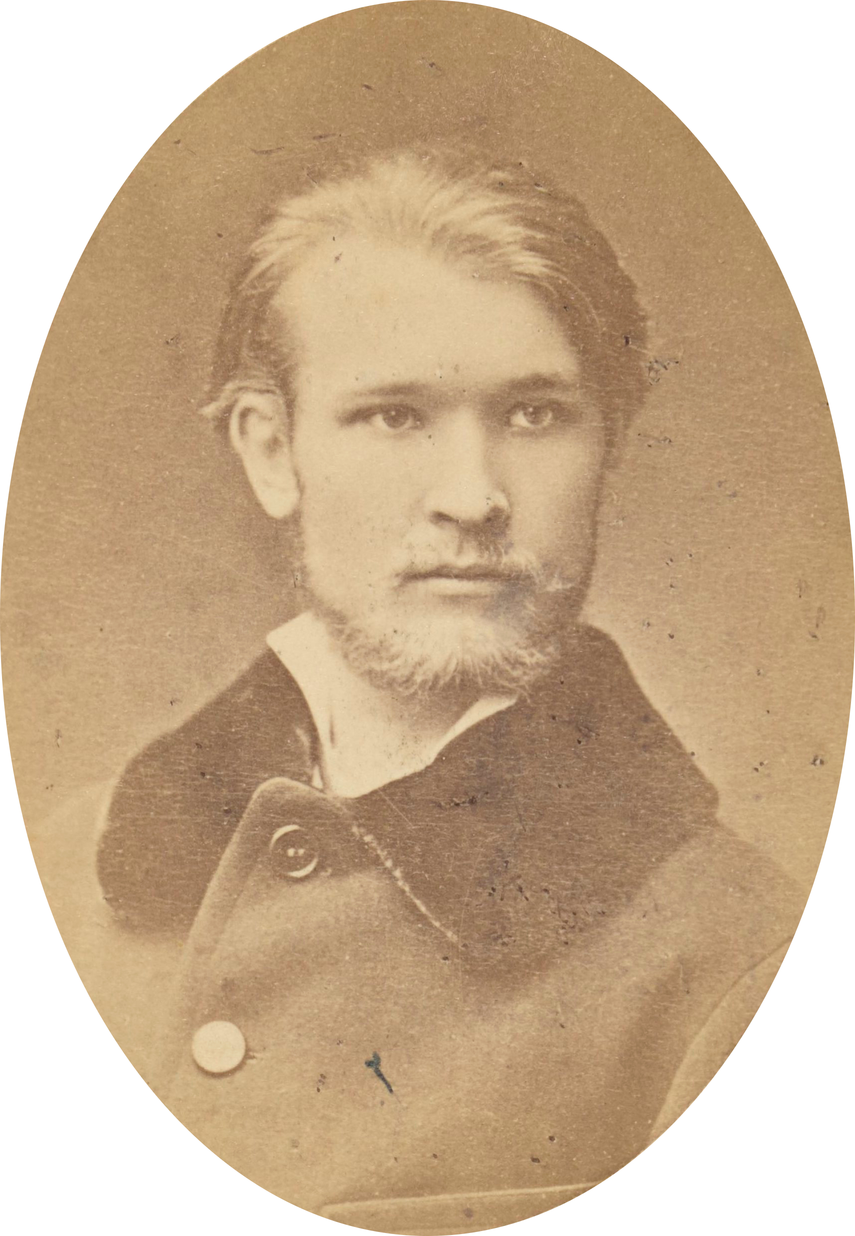 Franciszek Krudowski, 1882 r.